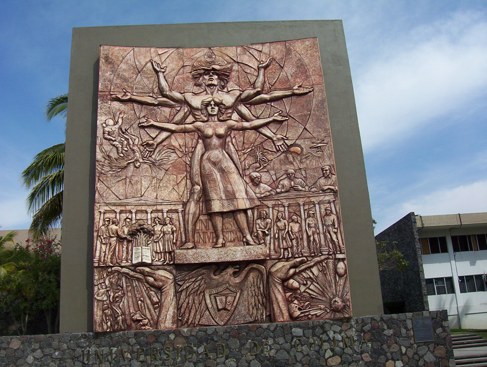 Foto UCOL México, un mural de la rectoría.